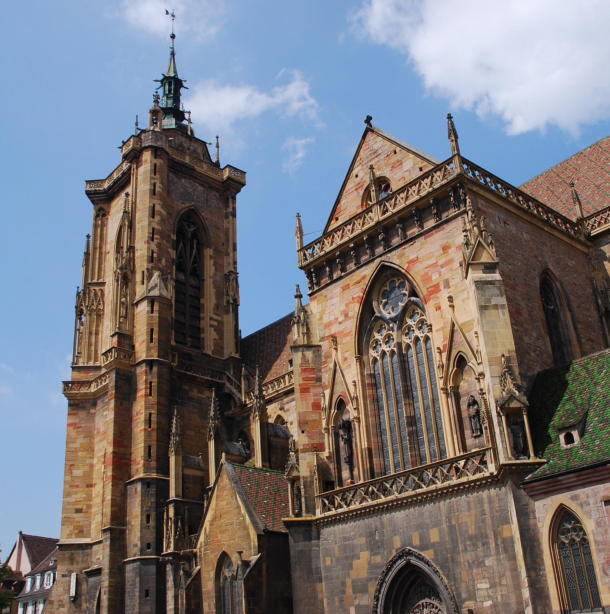 Seitenansicht des Colmarer Martinsmünsters in Richtung des Turms